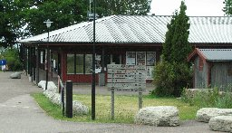 Lundegårds entré